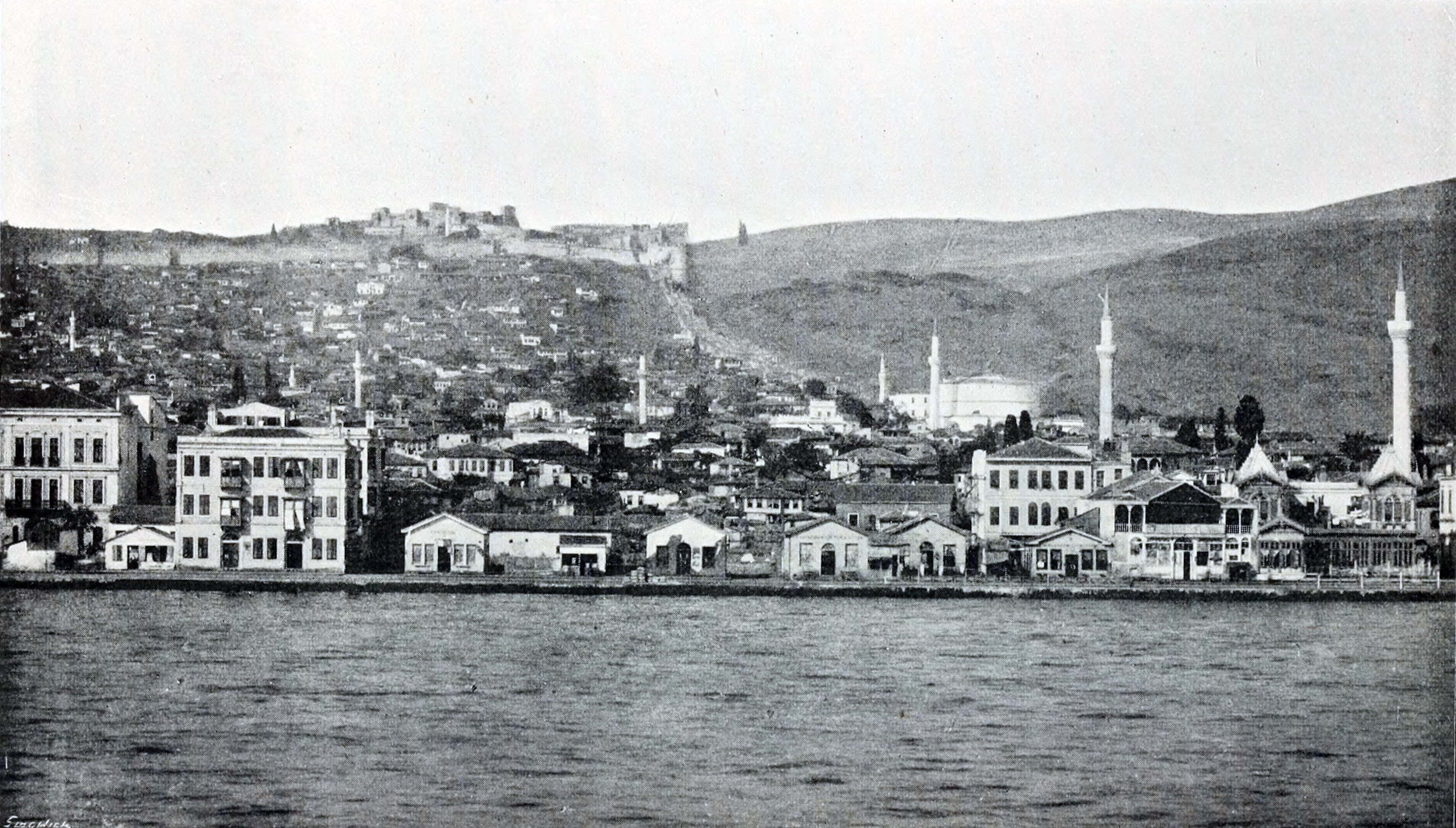 Le front de mer de Thessalonique, 1916